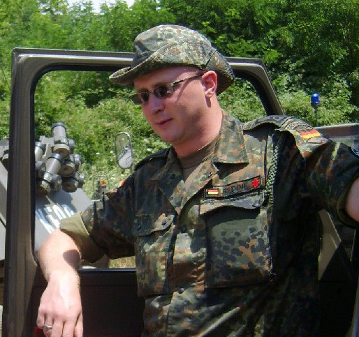 redjudge im Einsatz